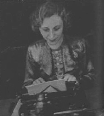 Maryna Radoměrská (1906-1993), česká spisovatelka